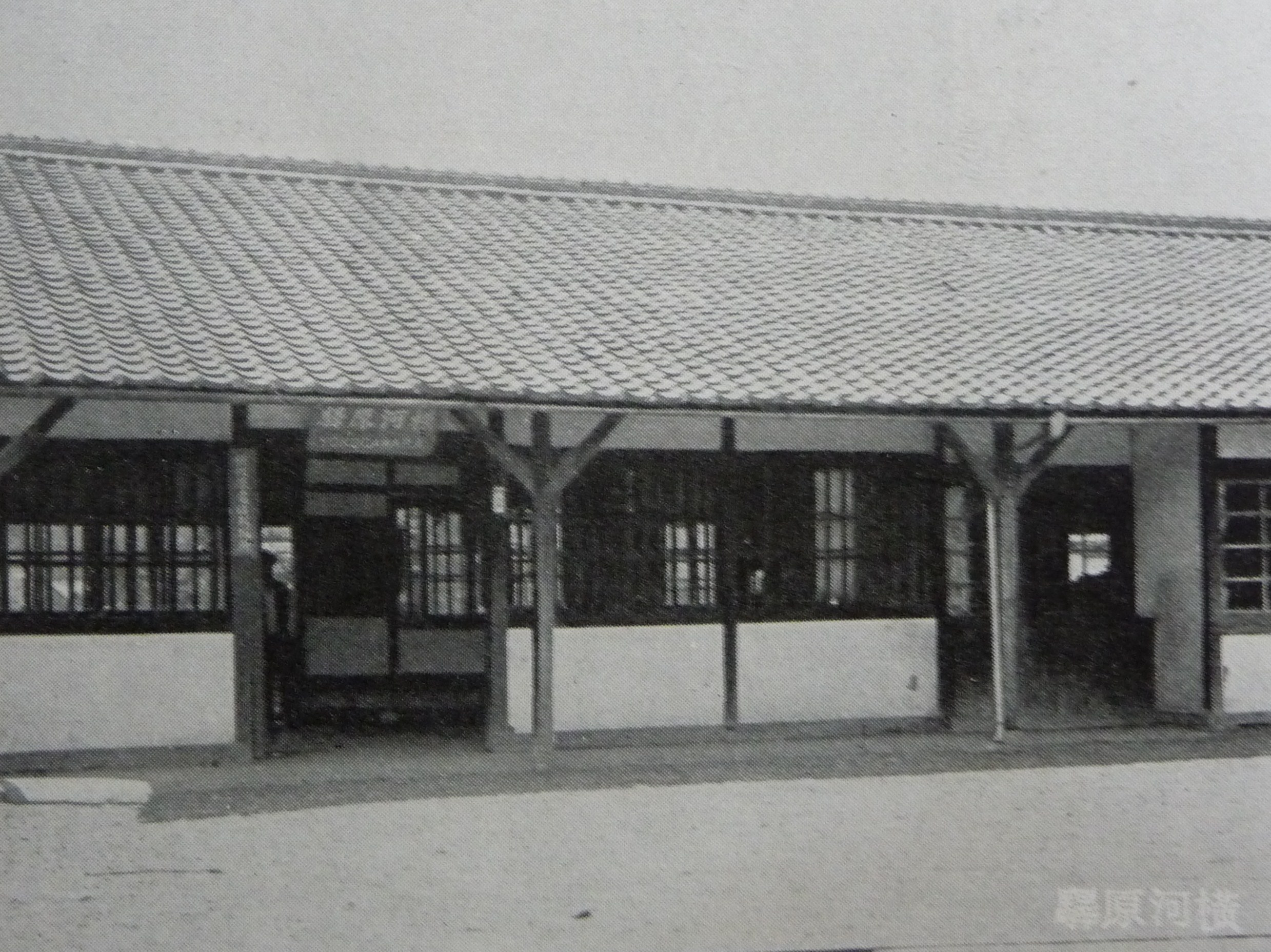 伊予鉄横河原駅